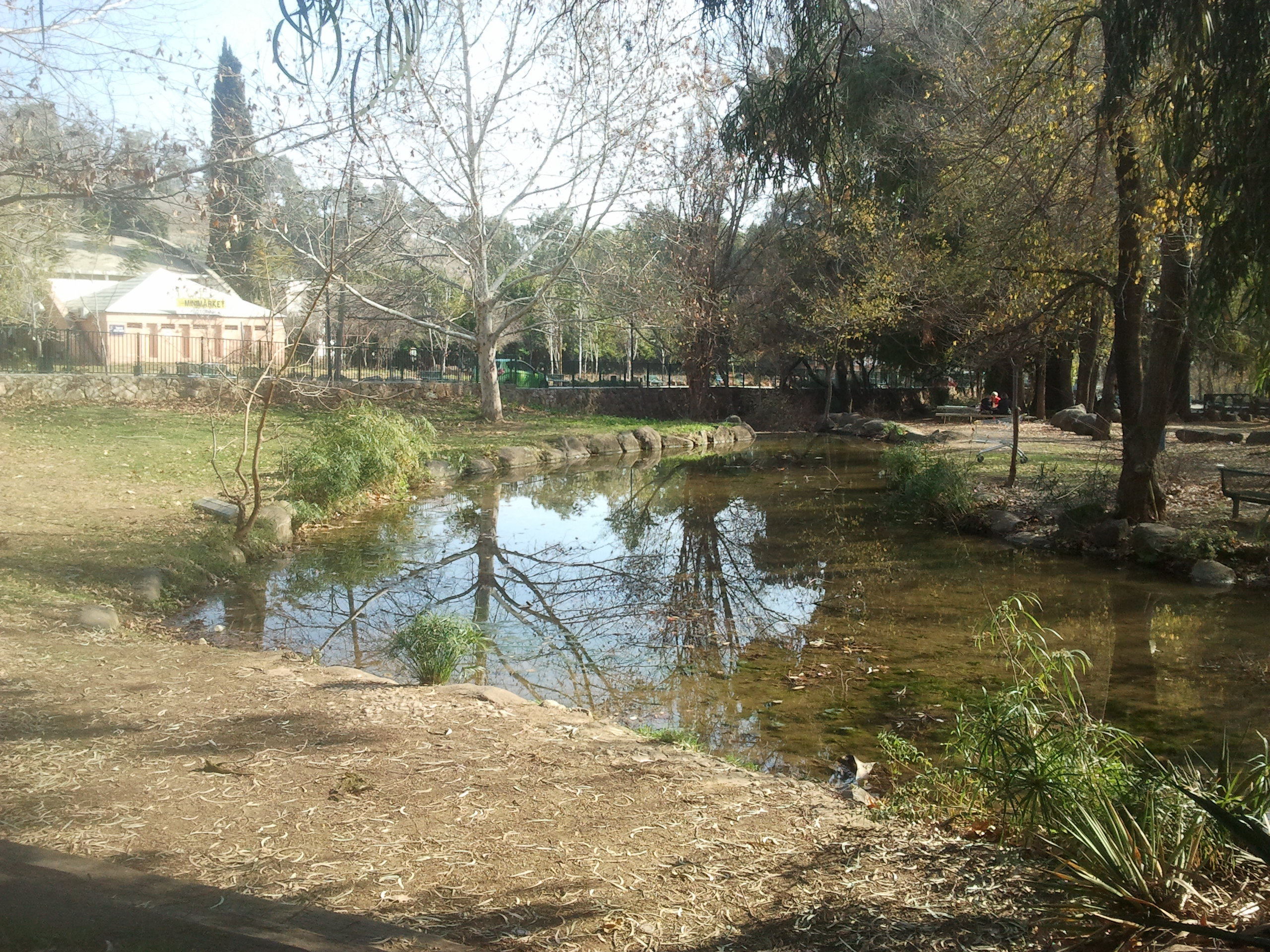 פארק הזהב הוא הפארק המרכזי העירוני בקרית שמונה. בתוכו זורם נחל עין זהב